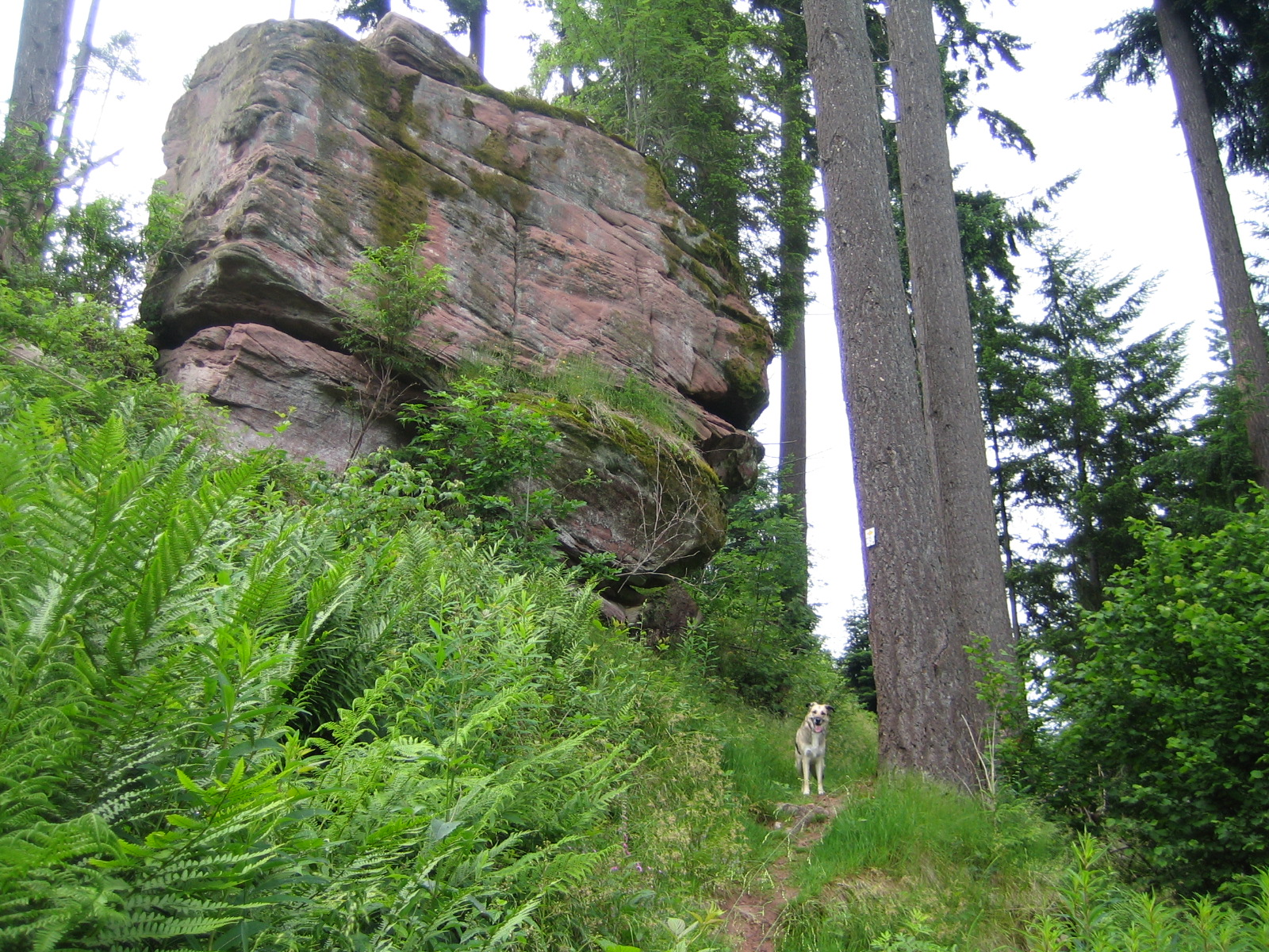 Der Hohlenstein ist ein mächtiger Findling aus Buntsandstein.